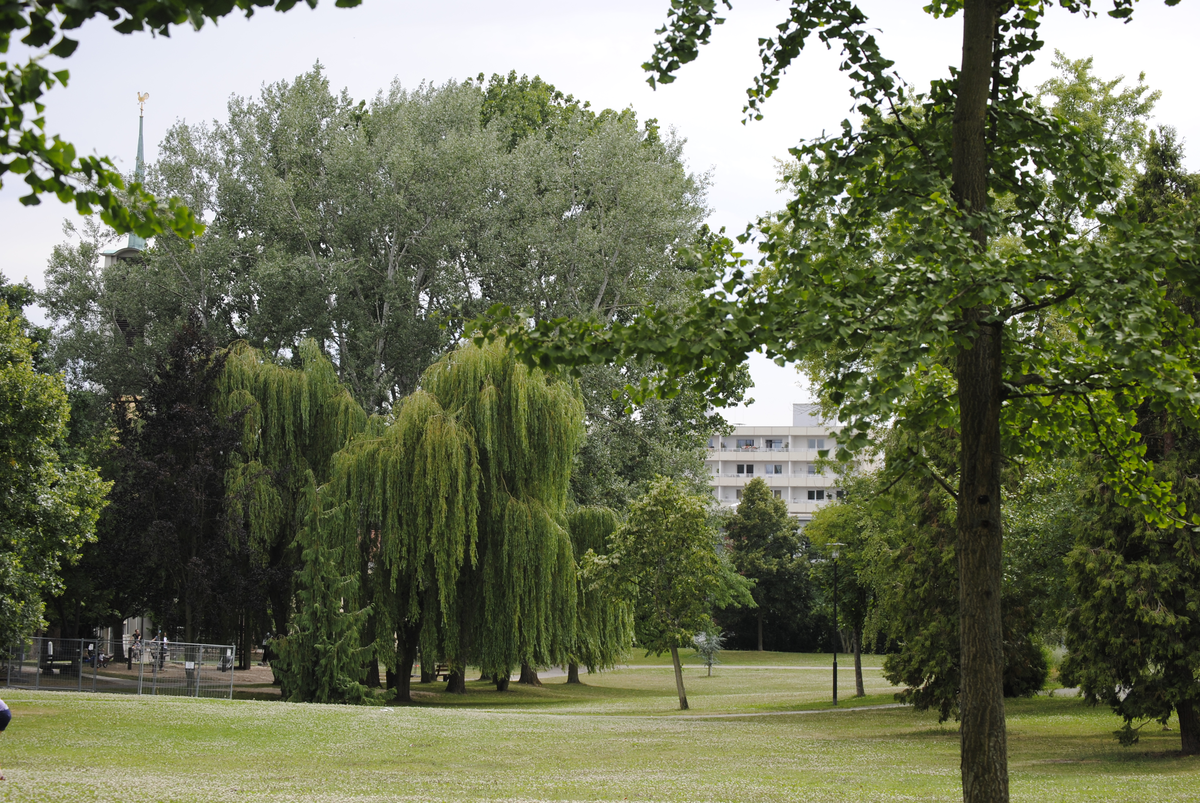 Der Neue Kurpark in Bad Soden am Taunus